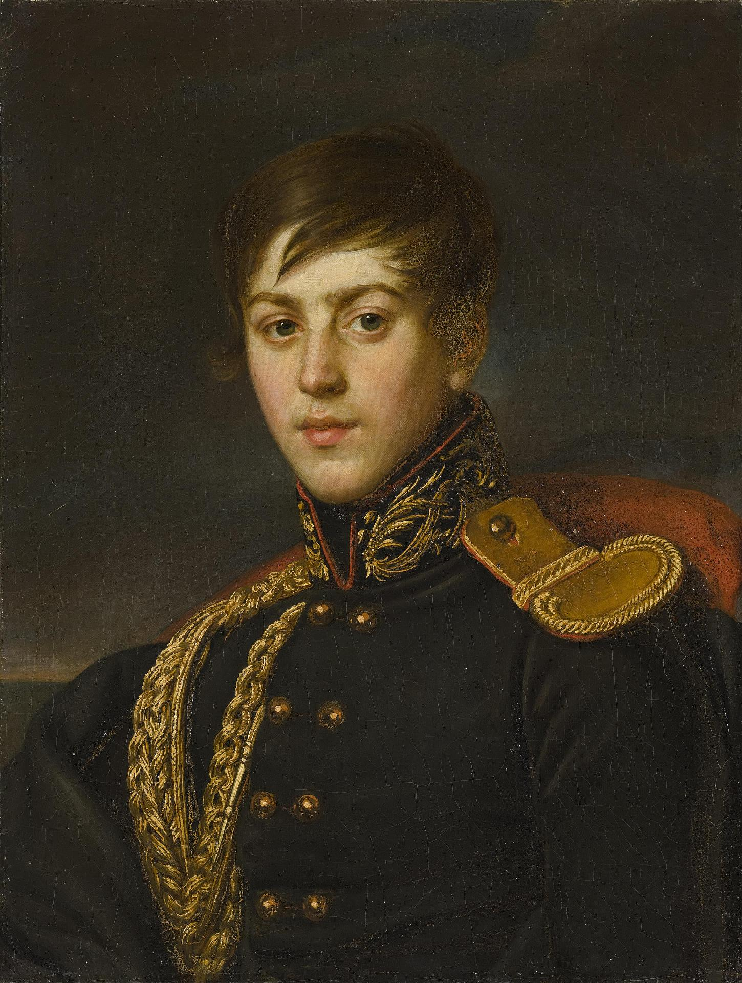 Портрет графа Александра Павловича Строганова